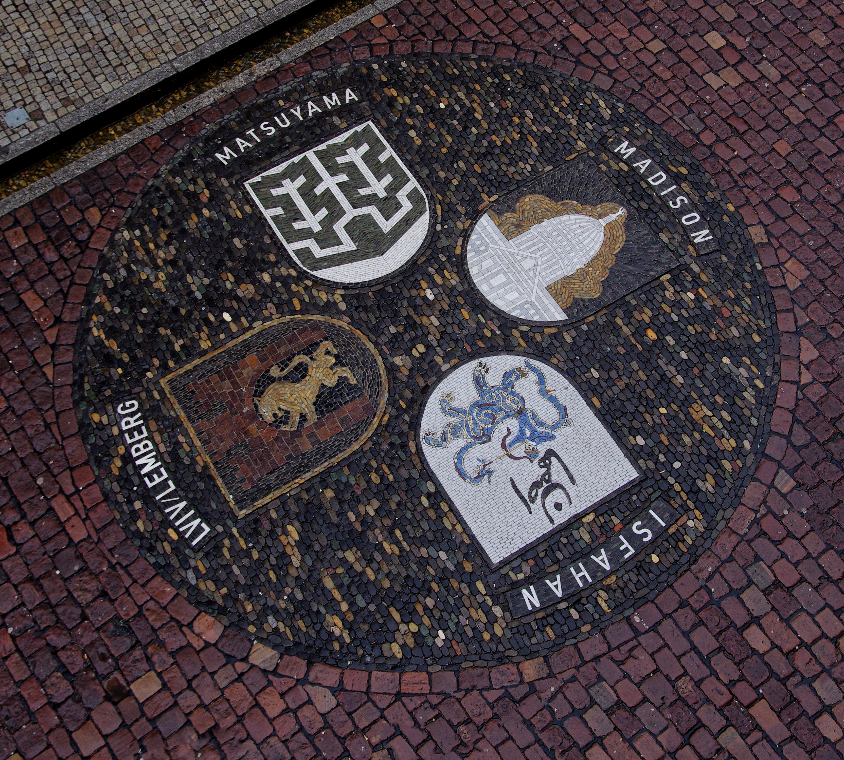 Pflasterbild mit den Wappen der Partnerstädte vor dem Alten Rathaus in Freiburg